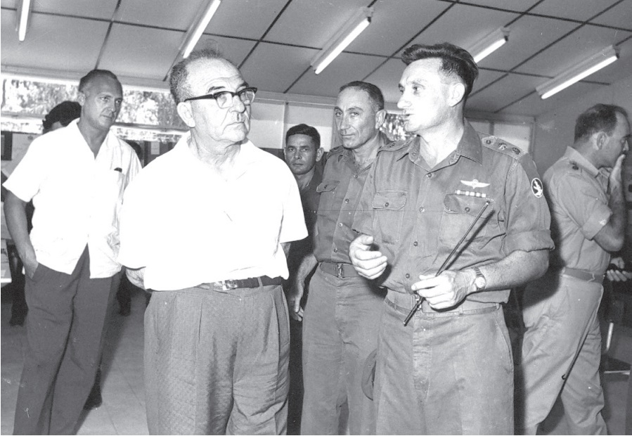 סא"ל אורי גורן מארח את ראש הממשלה ושר הביטחון, לוי אשכול, בביקור ביחידה הטכנולוגית של אמ"ן. בין שניהם: ראש אמ"ן, מאיר עמית